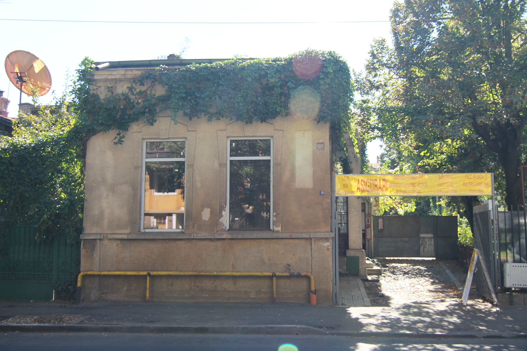 Casă pe Calea Călărașilor